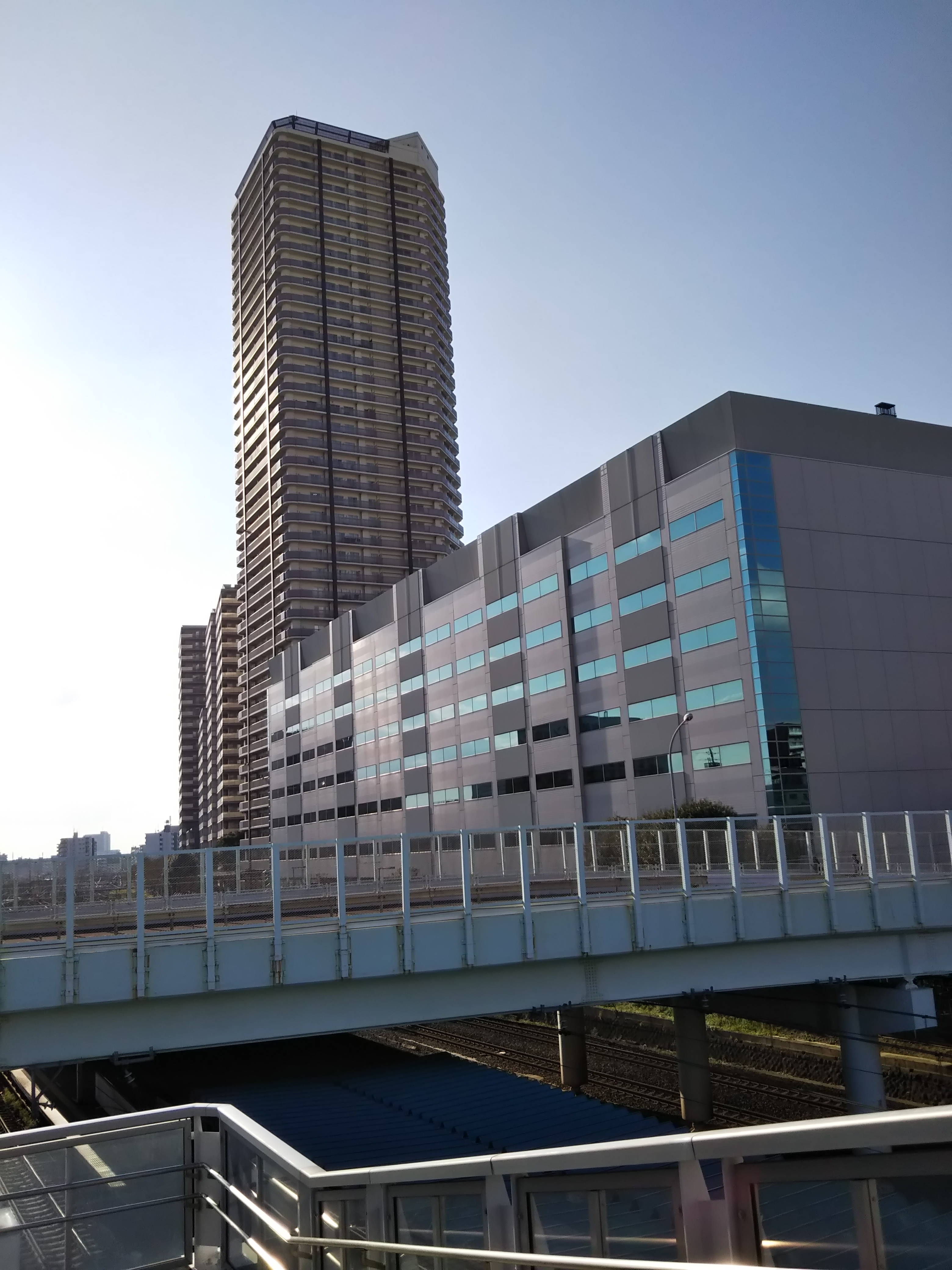 横浜市神奈川区新子安、オルトヨコハマ